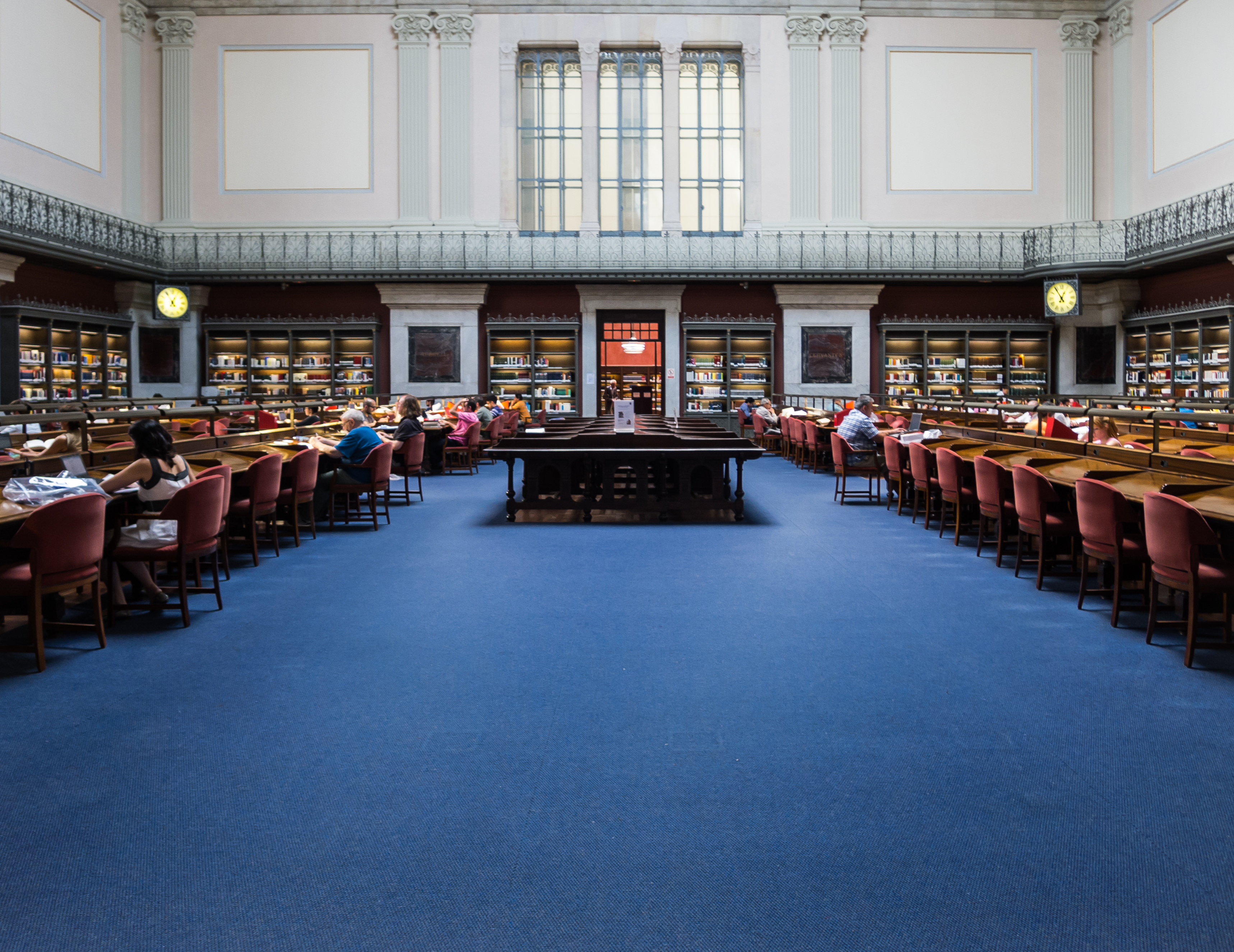 BNE